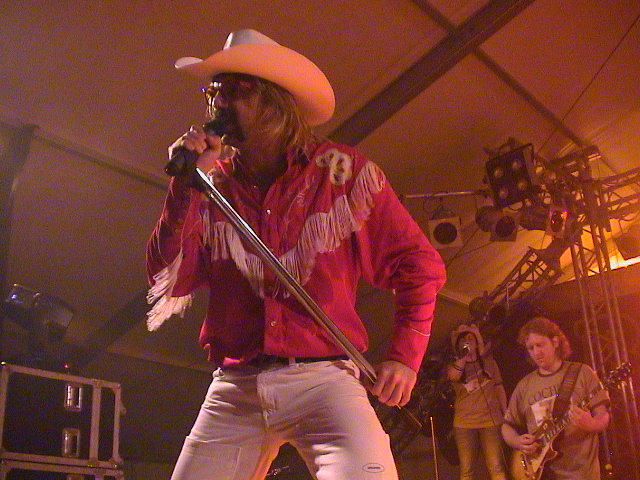 IL BEPI